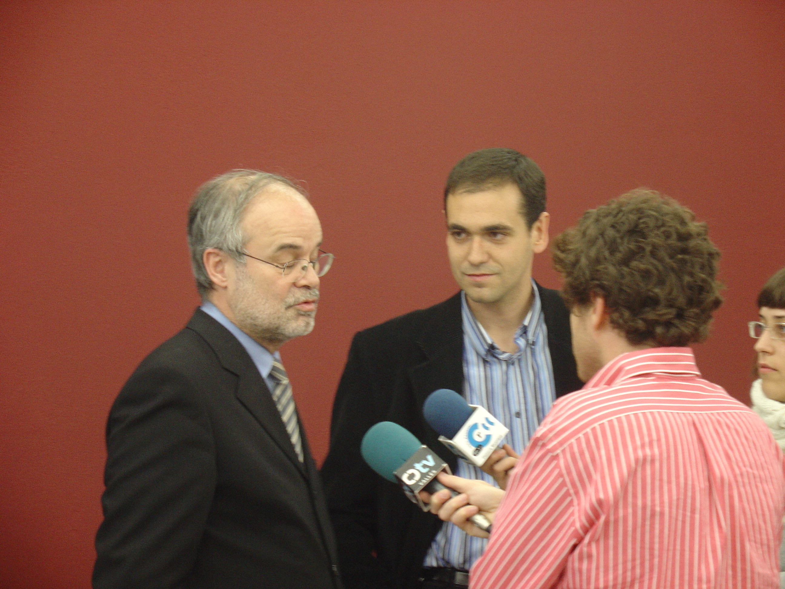 Antoni Casells & Ignasi Giménez